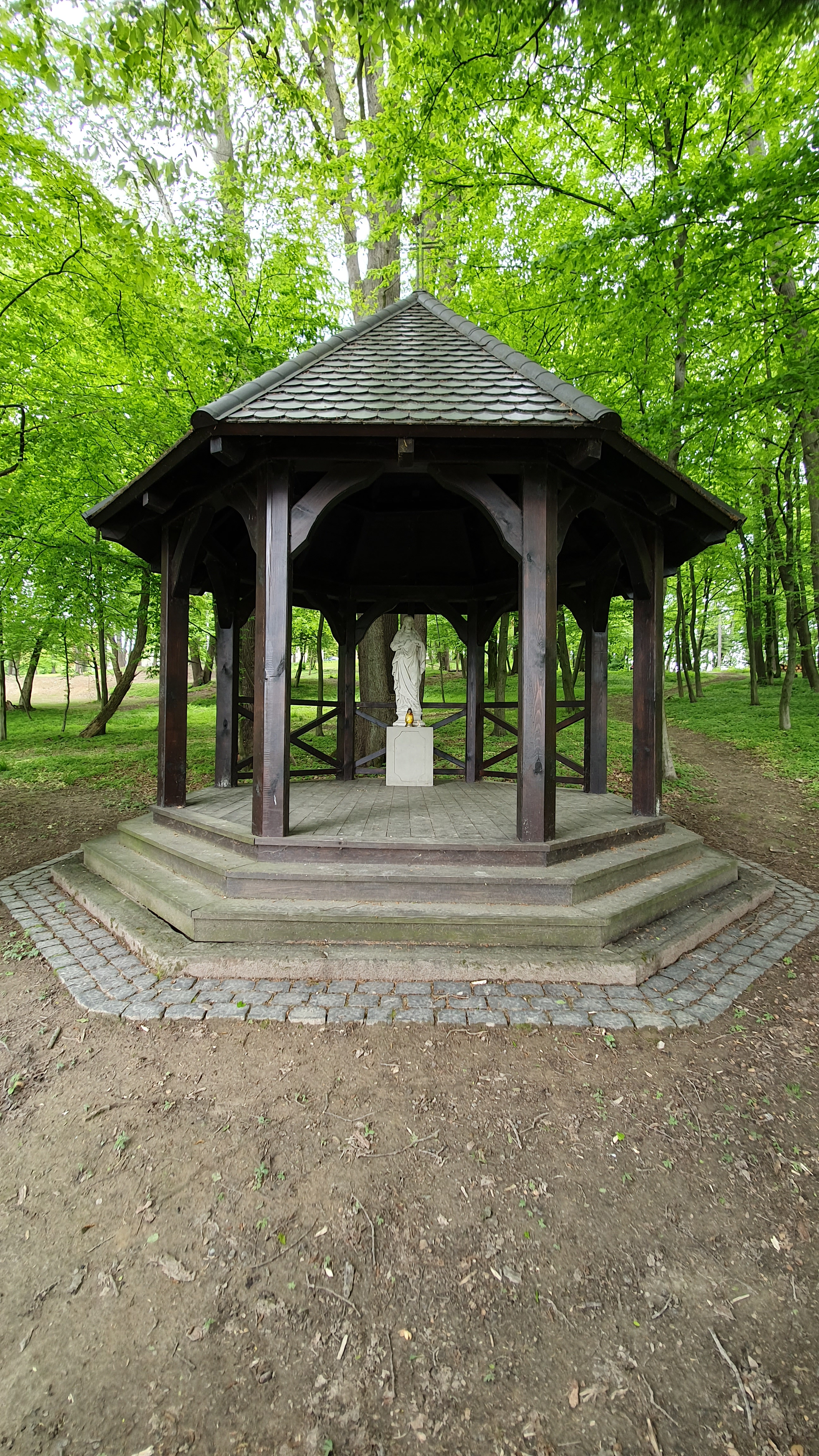 Dwór Sieraków, 2019, kapliczka